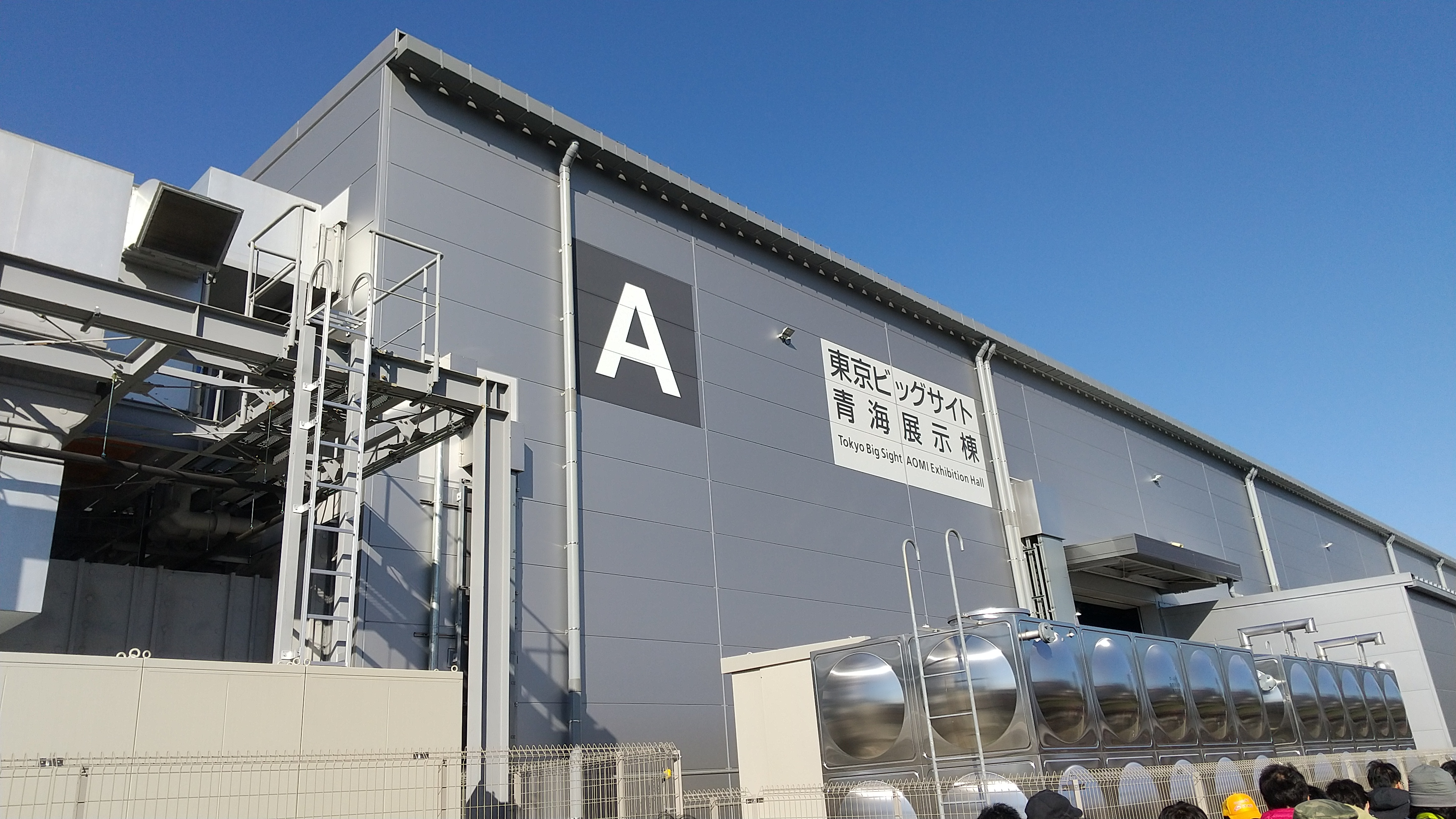 東京国際展示場の青海展示棟において開催されたコミックマーケット97の様子（企業ブース）